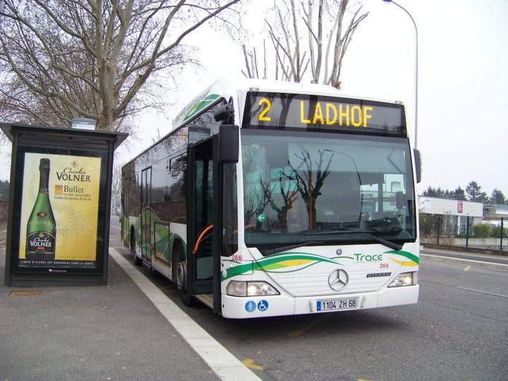 Photo d'un bus ligne 2 à l'arrêt "Cimetière du Ladhof". Photo de Titus